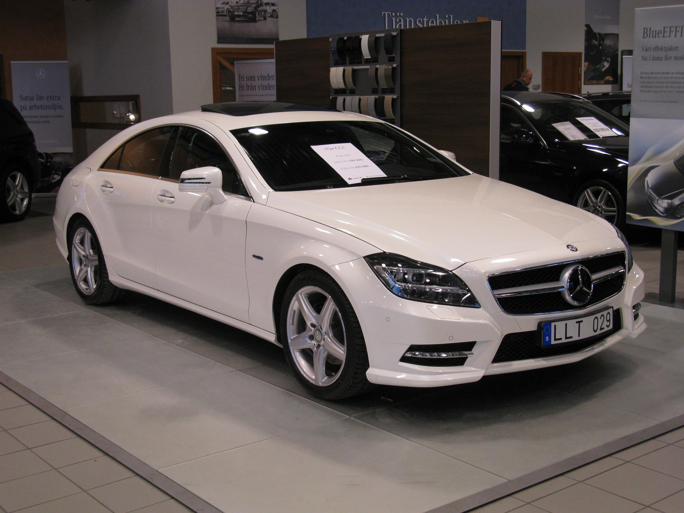 Mercedes-Benz CLS 350 CDi